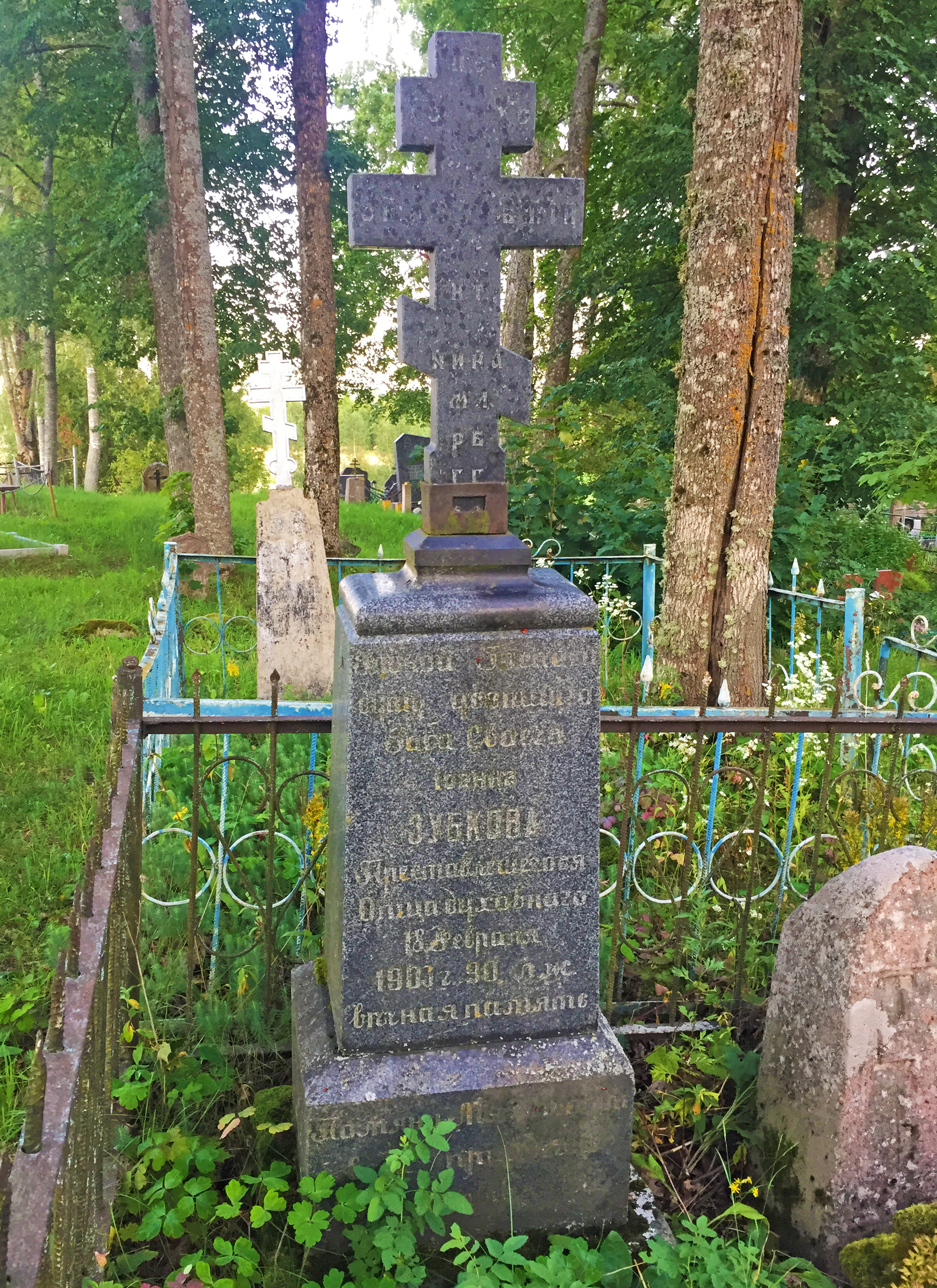 Памятник на месте захоронения наставника Михаловской старообрядческой церкви И.С. Зубкова